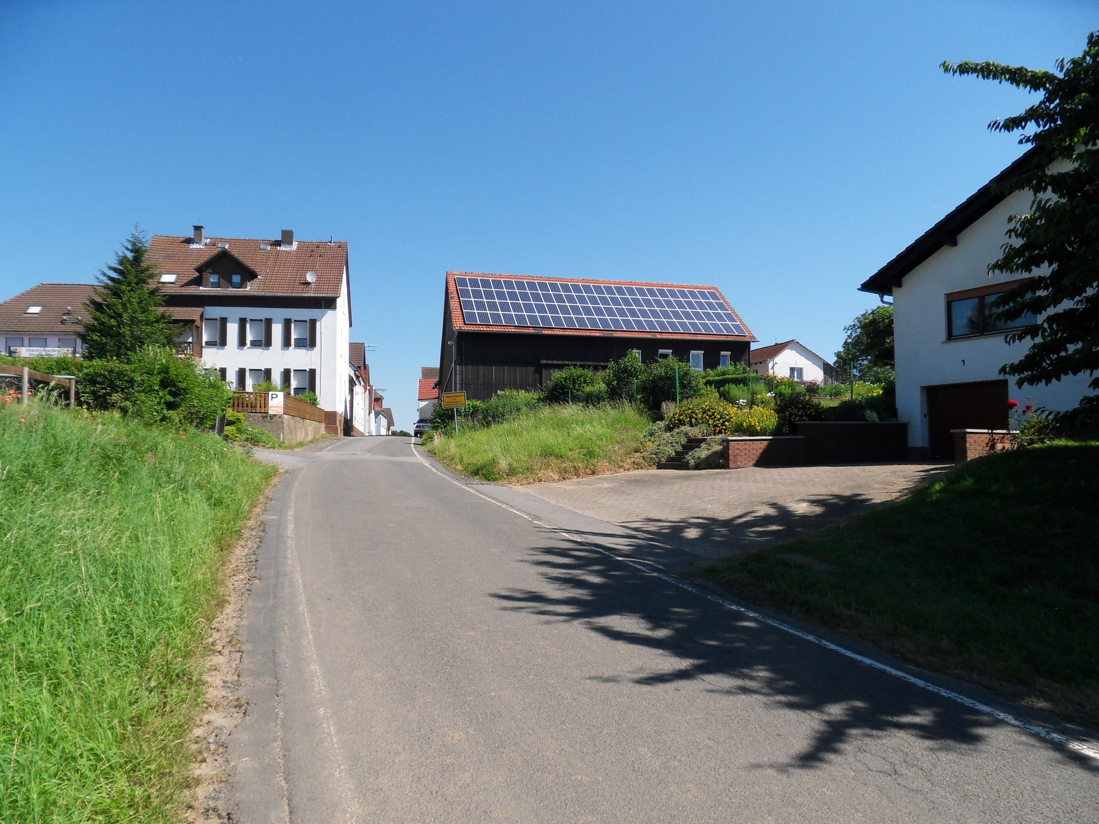 Zufahrt über die Kreisstraße nach Hippelsbach. In Höhe des Ortsschildes überquert die Straße die Kreisgrenze vom Odenwaldkreis zum Landkreis Darmstadt-Dieburg. Somit gehört das Anwesen am rechten Bildrand zu Wersau in der Gemeinde Brensbach und die anderen Häuser im Bild sind Teil von Groß-Bieberau